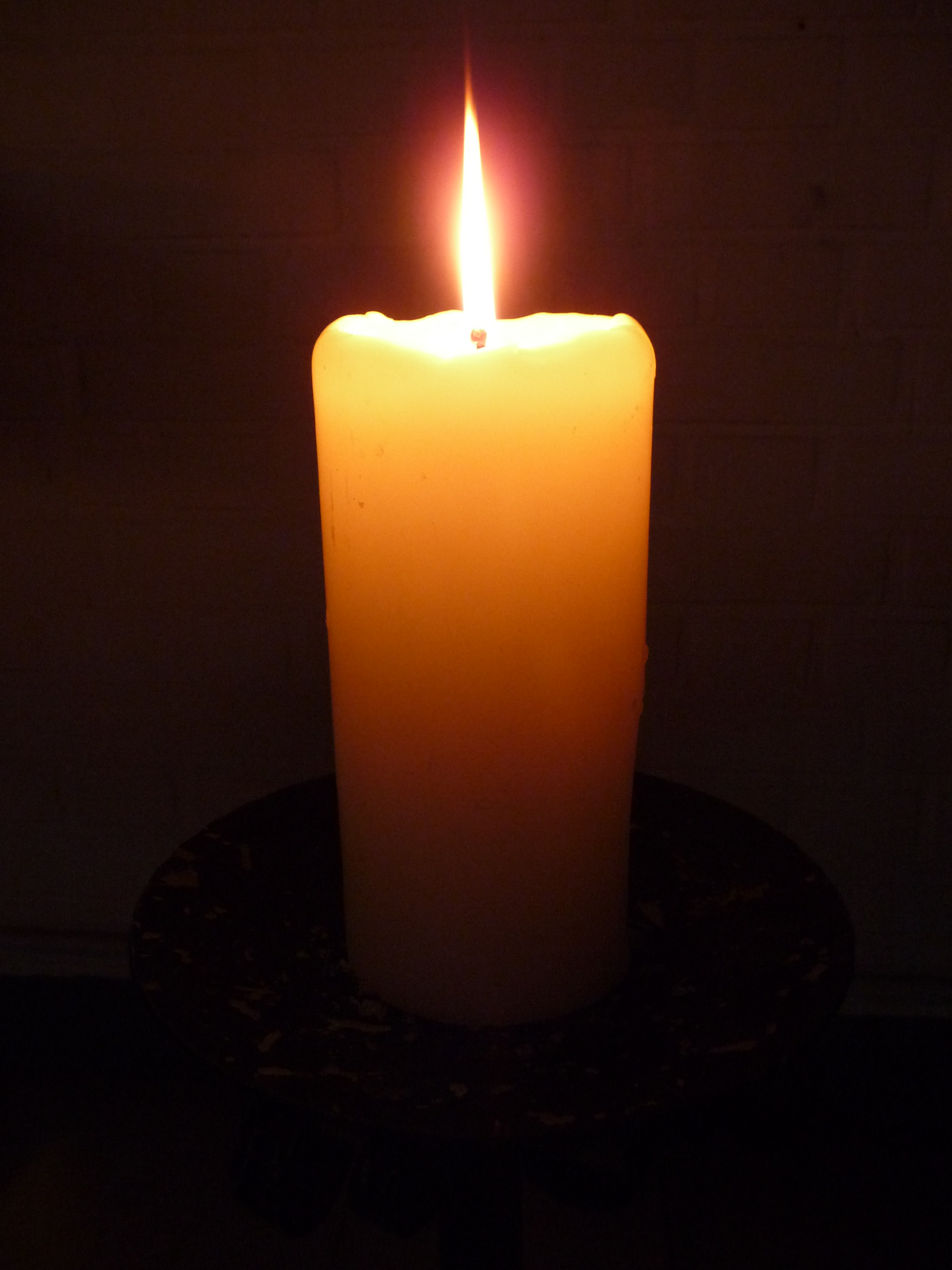 Einzelne brennende Kerze